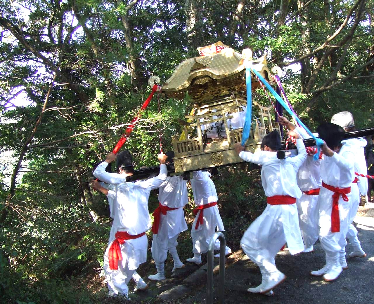 神峯神社から神輿が下ろされる